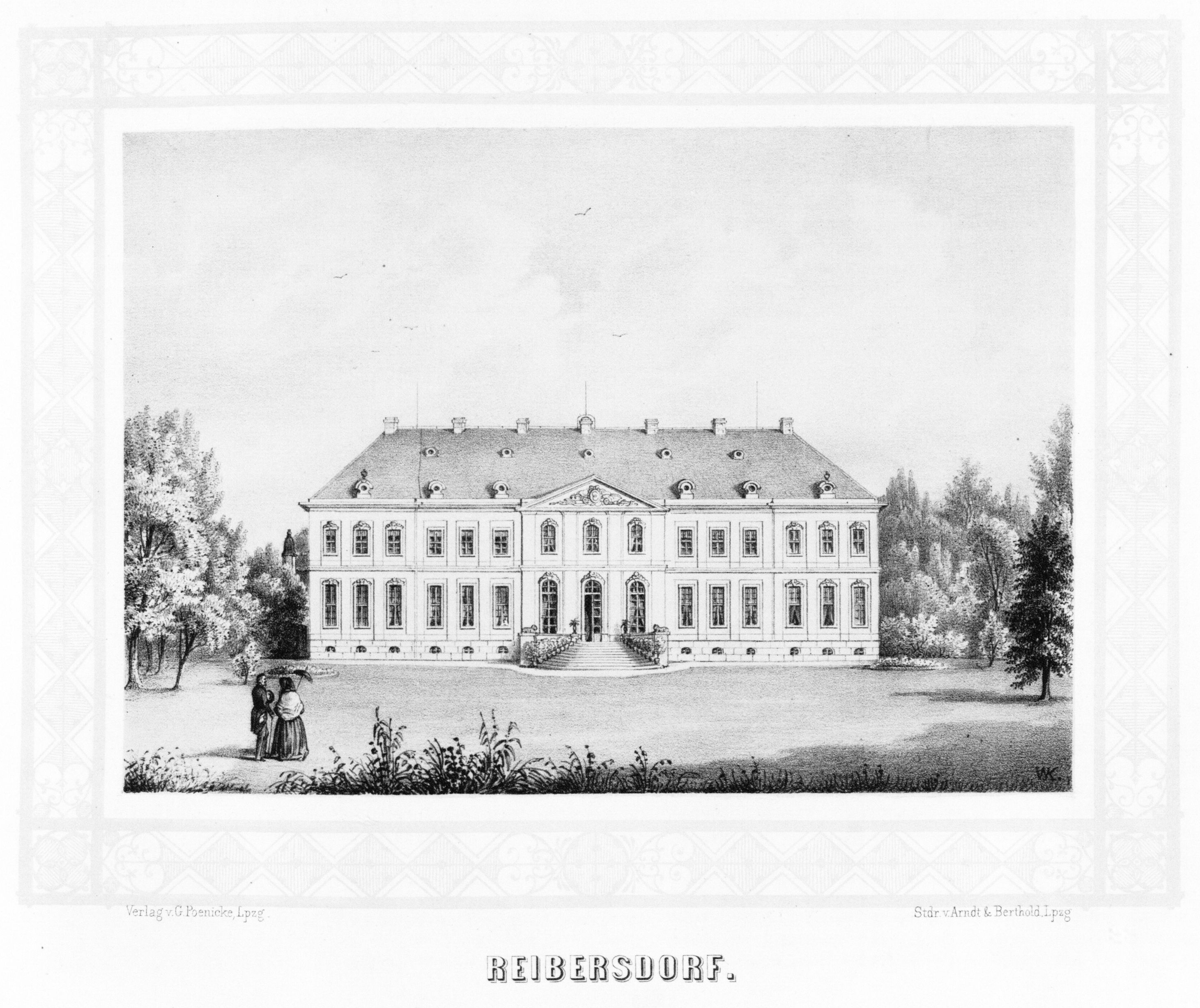 Reibersdorf aus: Album der Rittergüter und Schlösser im Königreiche Sachsen Markgrafenthum Oberlausitz Section: III